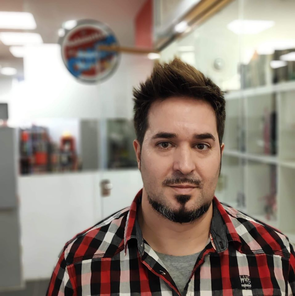 Dibujante y guionista